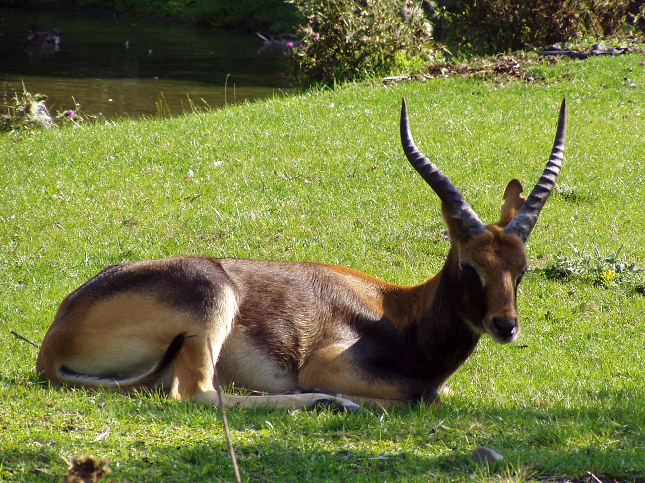 Kobus megaceros - male (Prague Zoo)